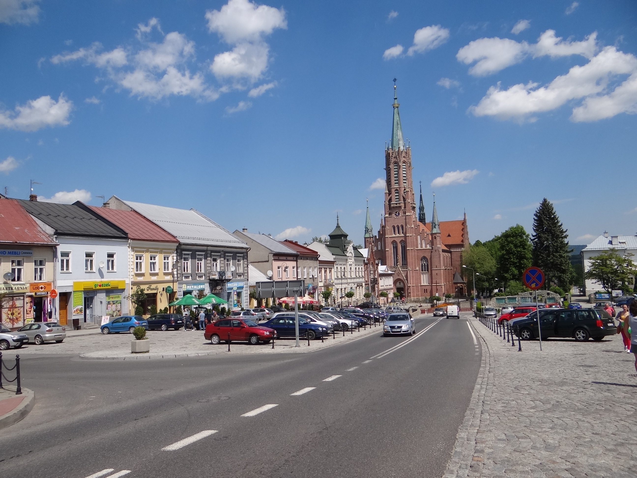 Centrum Grybowa